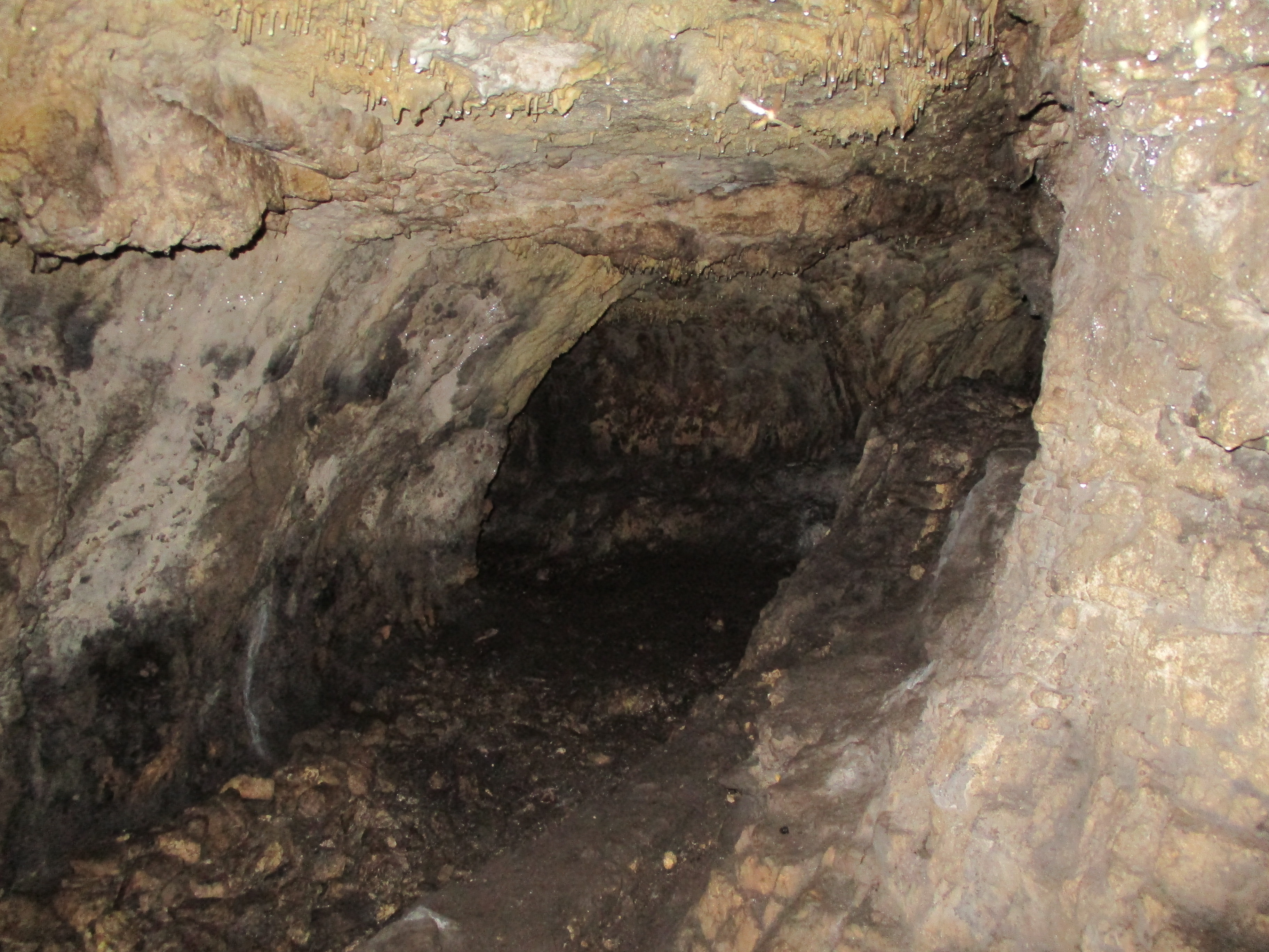 Ingresso della grotta